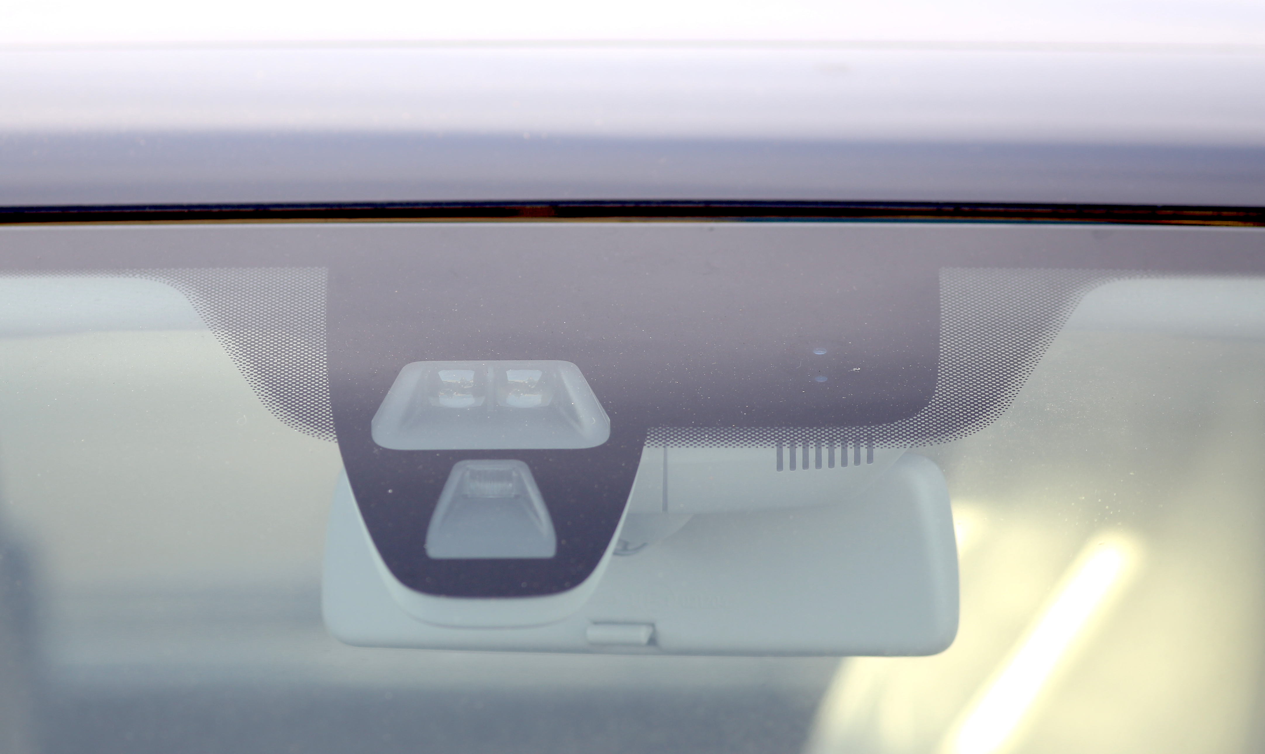 billede af bremsekamera på en VW Up med regnsensor